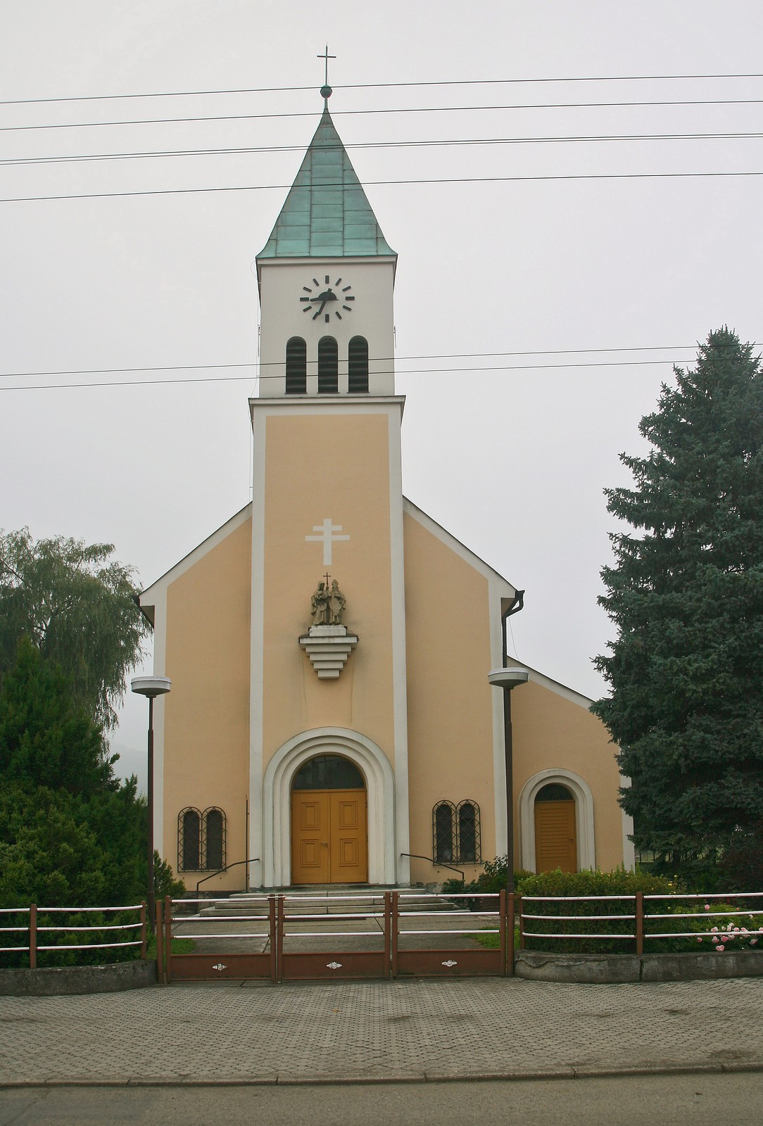 Kostel sv. Cyrila a Metoděje